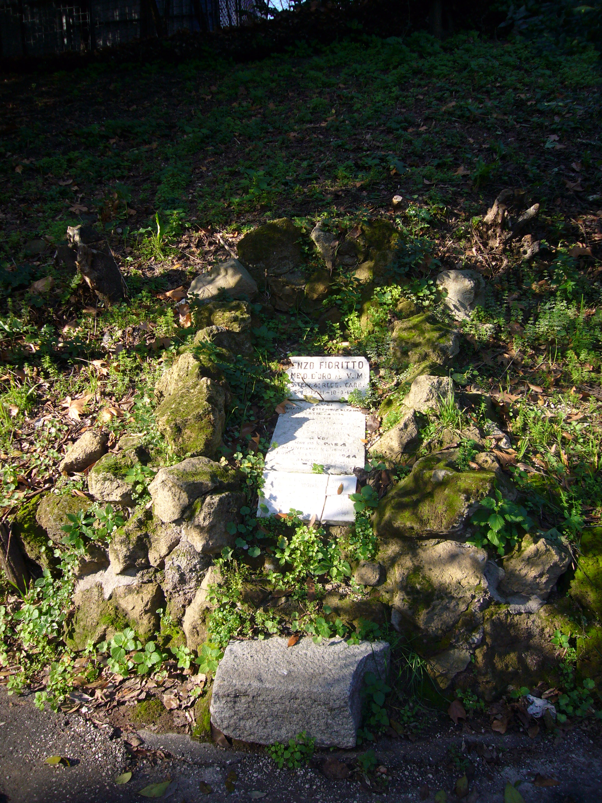 Roma, via Baccelli. Lapide in memoria del sottotenente Vincenzo Fioritto, nel luogo in cui fu colpito a morte dai tedeschi, il 10 settembre 1943.